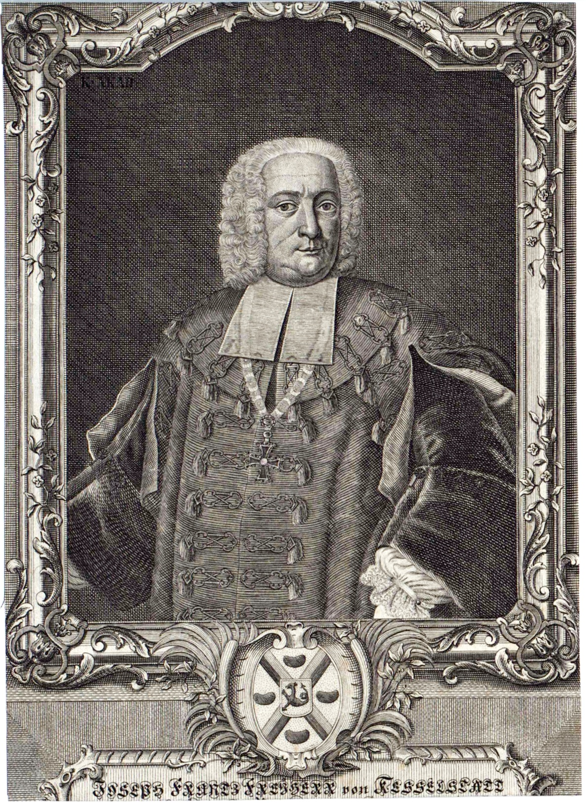 Freiherr Joseph Franz von Kesselstatt, Domherr und Diplomat in den Bistümern Mainz und Trier